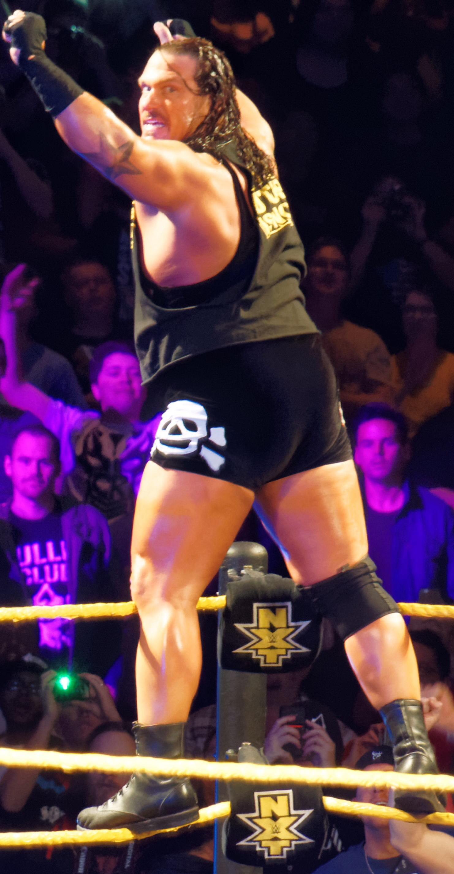 2015-03-27_23-14-04_ILCE-6000_3550_DxO